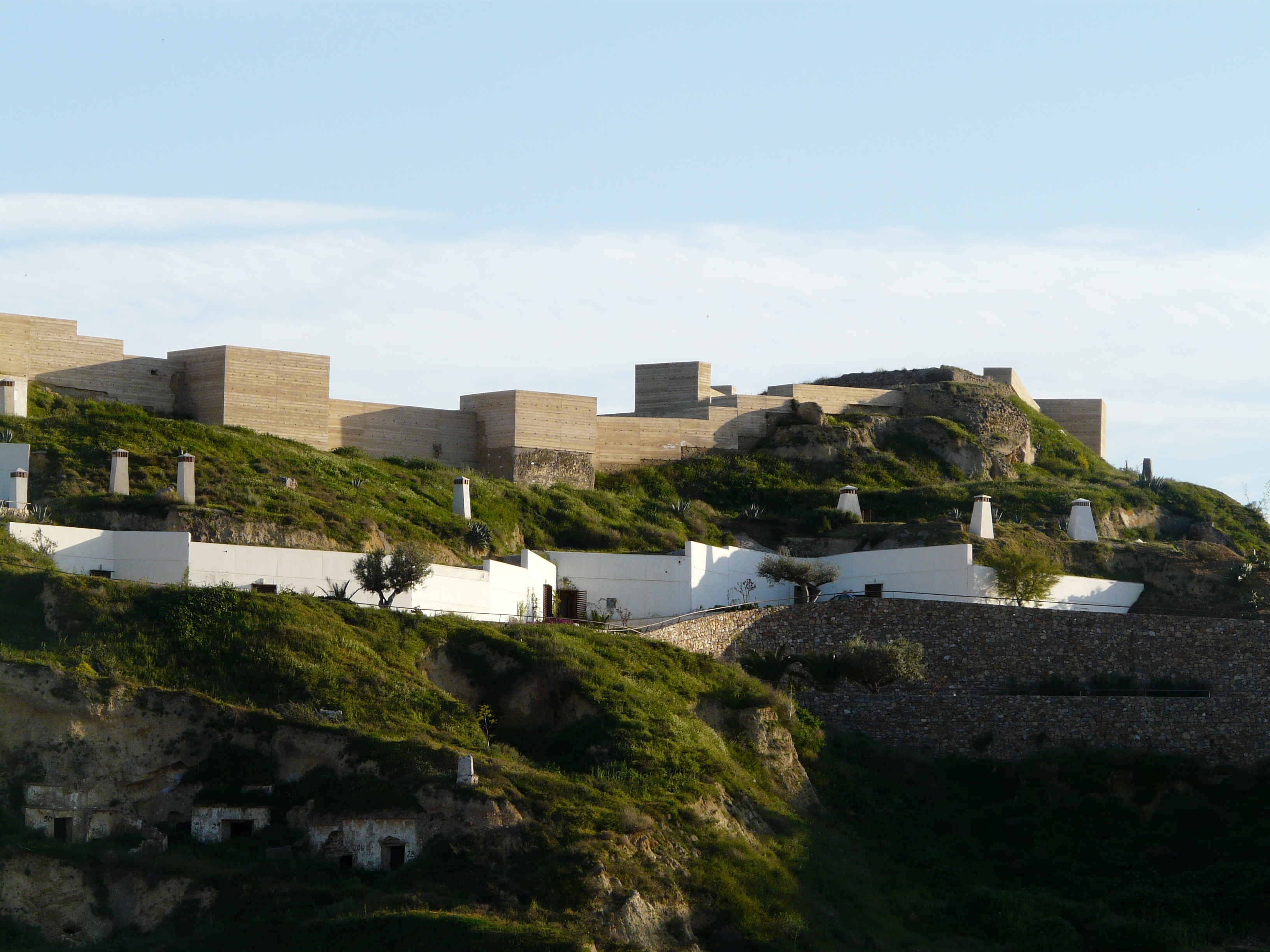 En primer plano se ven las casas cuevas tematizadas y en la cima del cerro el Castillo de Nogalte